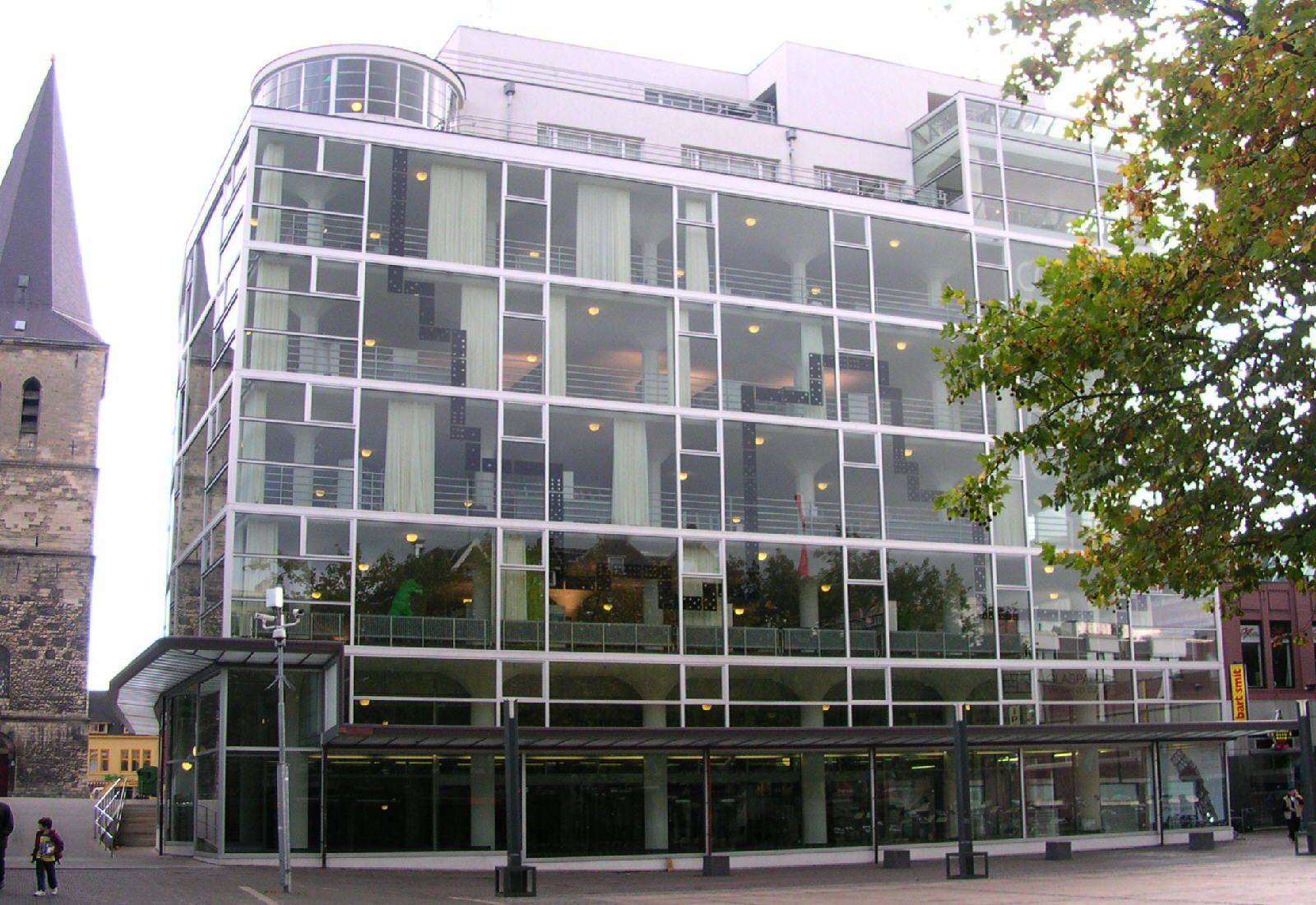 rk. Pancratiuskirche und Glaspalast in Heerlen